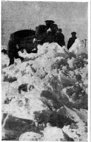 Tren vencido por la nieve en proximidades a Km 90